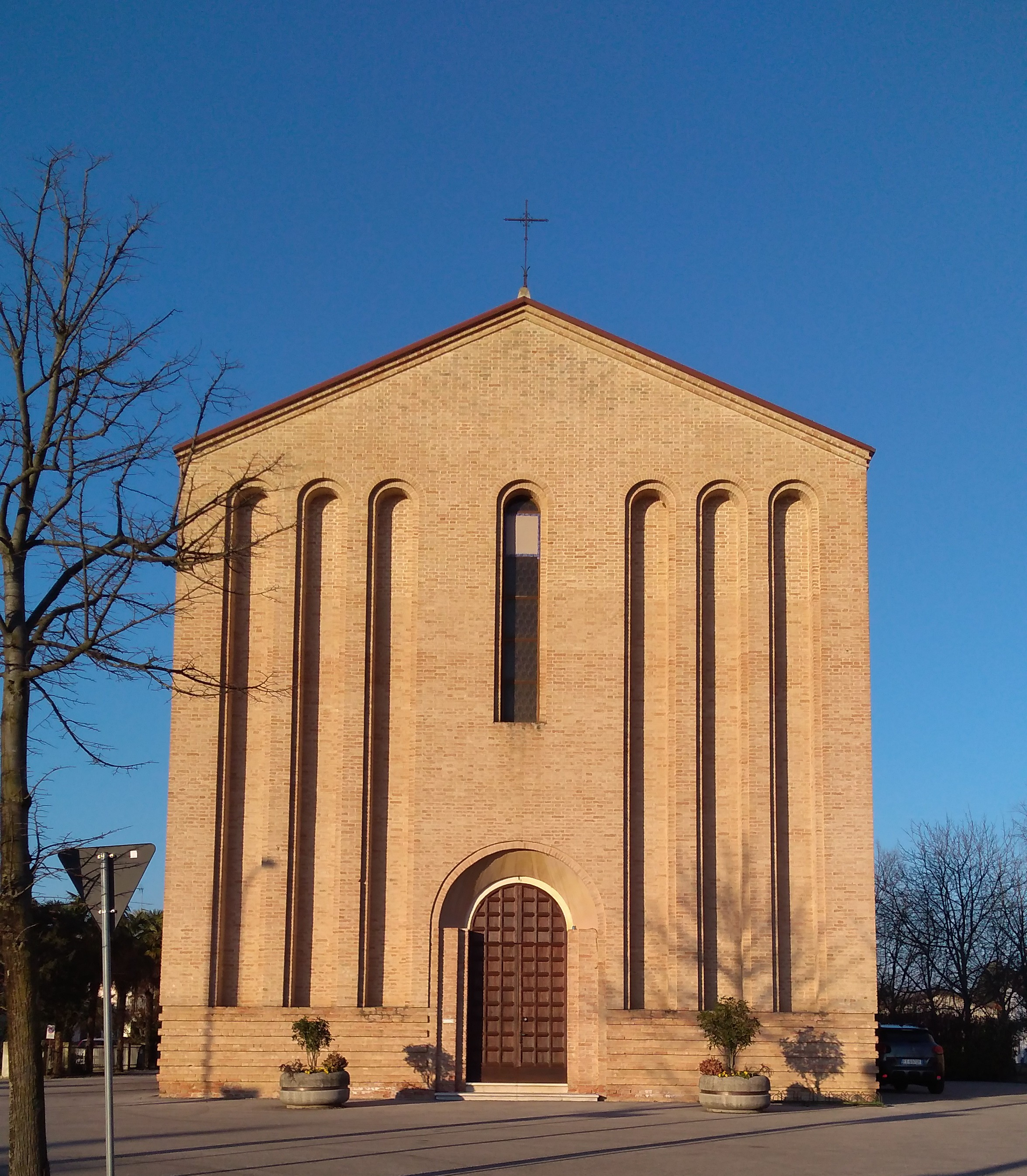 Facciata della chiesa di San Tomaso Apostolo a Faè di Oderzo